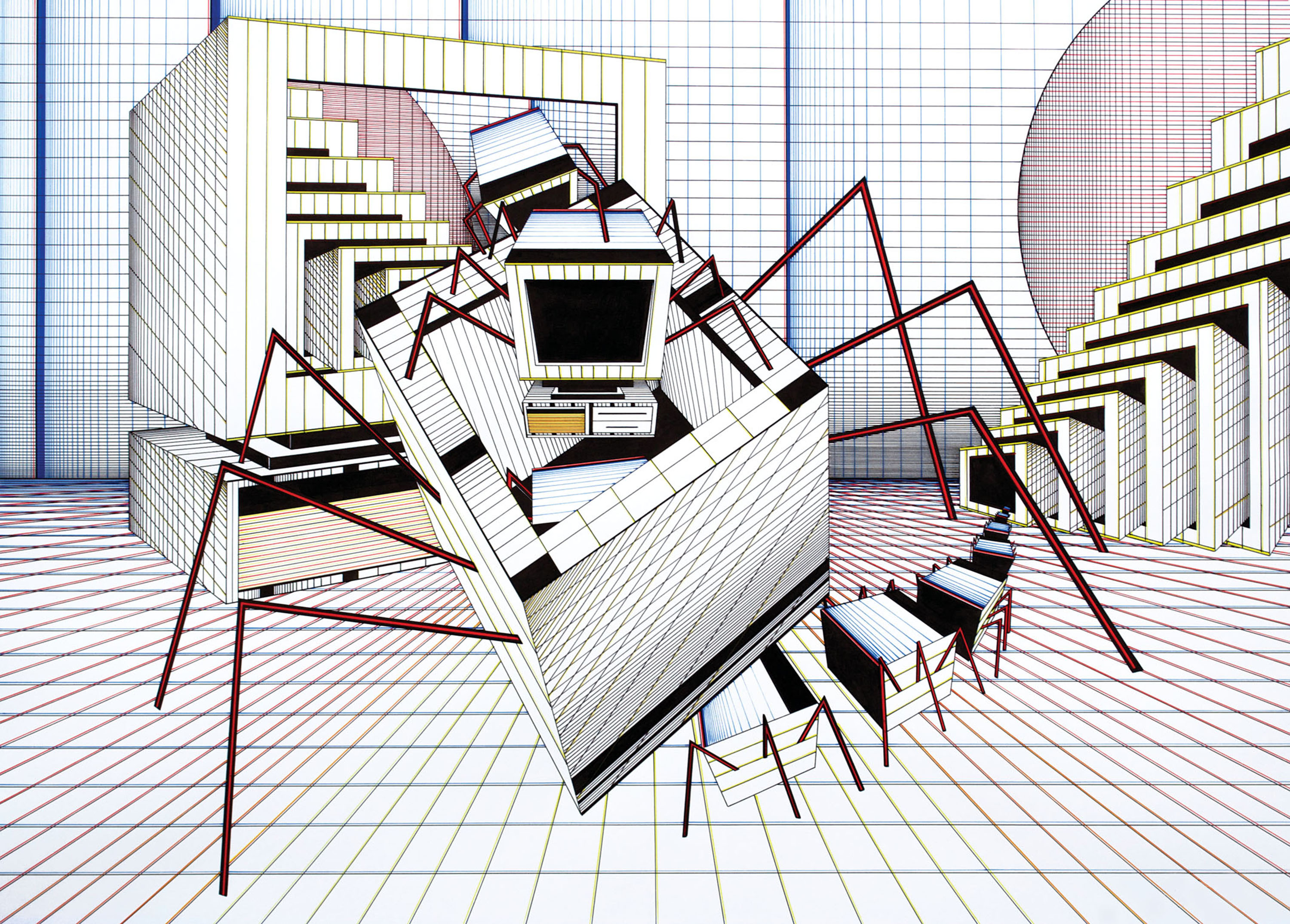 Grafisch schilderij door Dejo, 1990